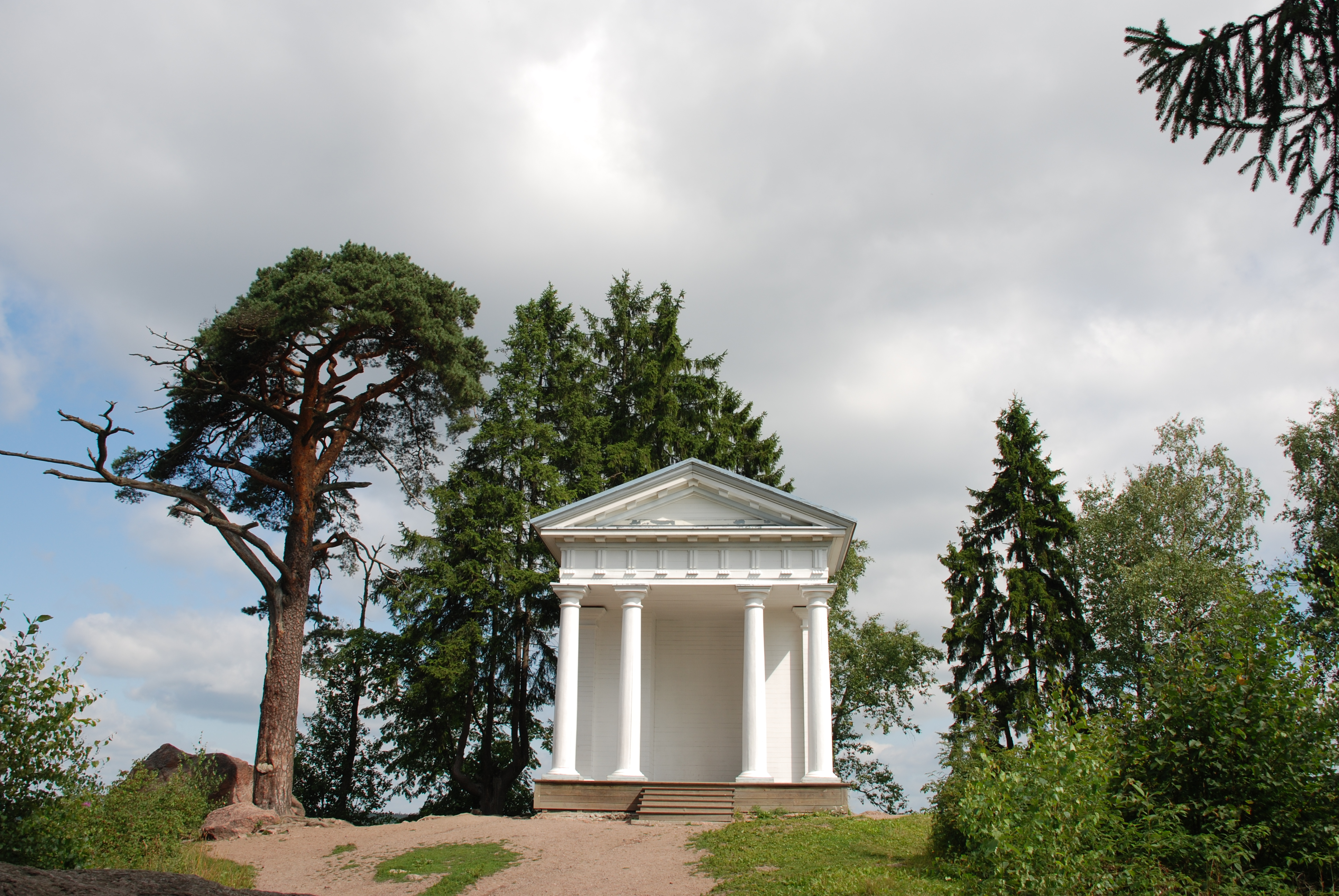 Комплекс усадебных домов и парковых сооружений (историко-архитектурный и природный заповедник усадьба-парк «Монрепо») (Санкт-Петербург и Лен.область, Выборг, парк Монрепо (парк Культуры и отдыха))